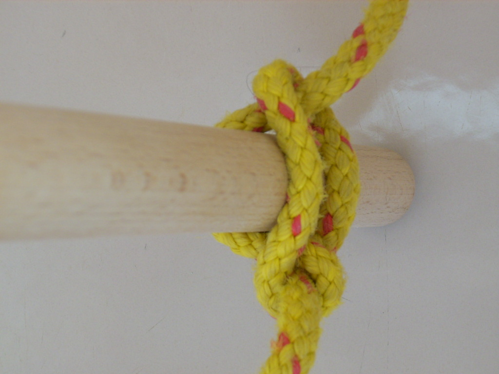 Strickleiterknoten zum Befestigen der Sprossen am Seil.